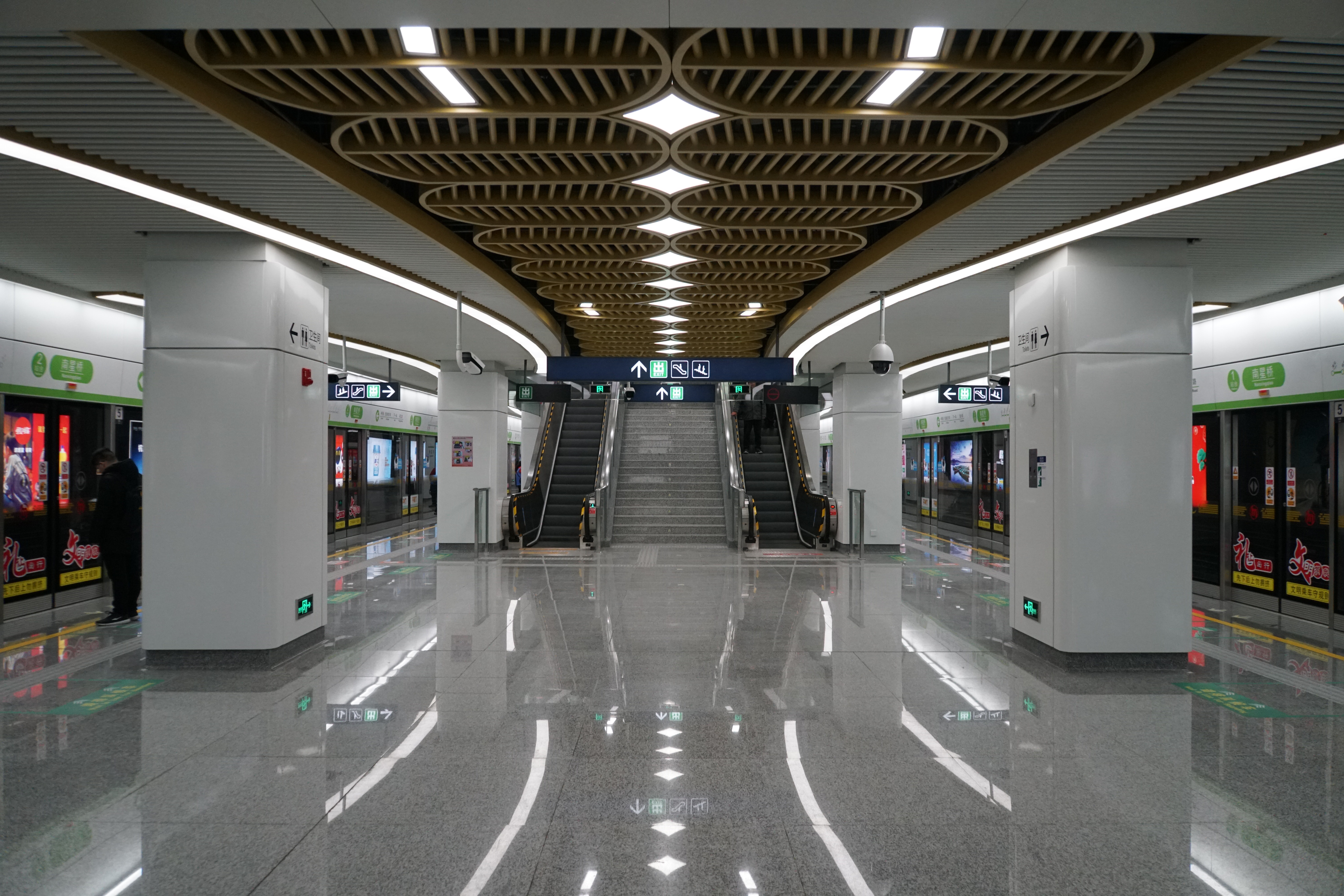 南星桥站4号线站台